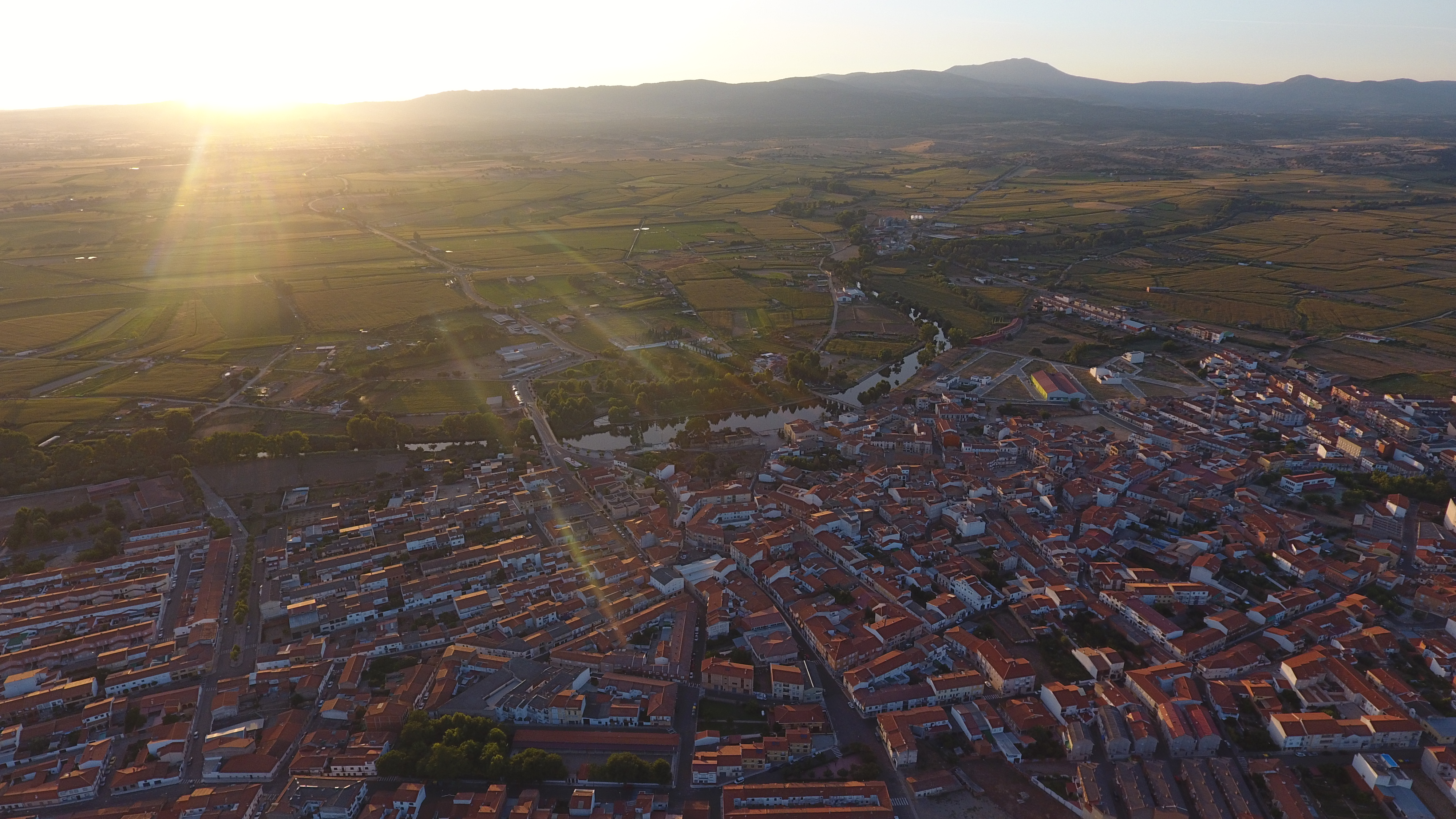 Pueblo a vista de pájaro